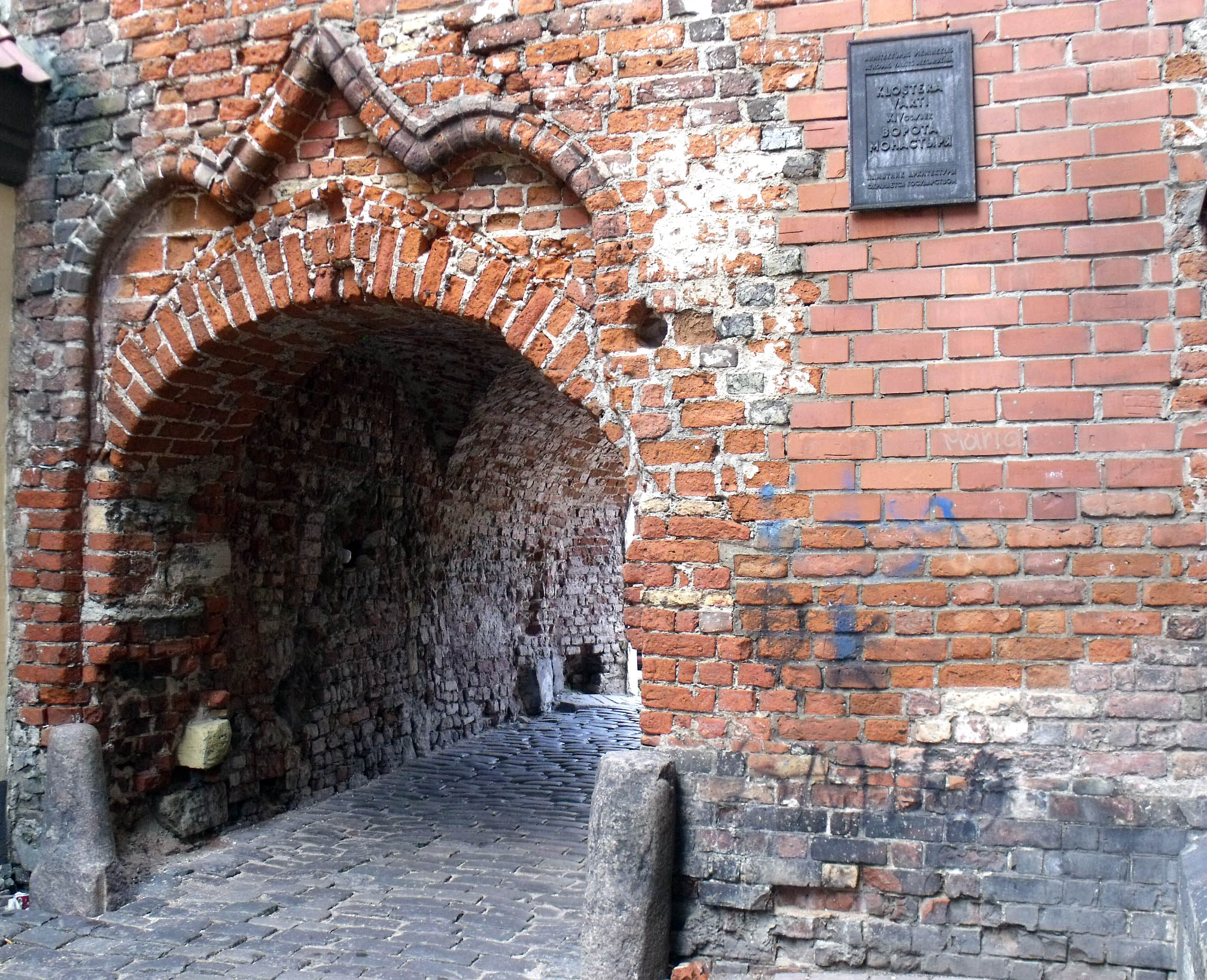 Jāņa sēta